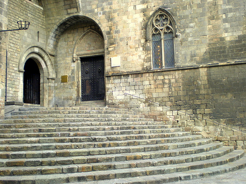 Barcelona - Escales del Palau Reial Major a la plaça del Rei